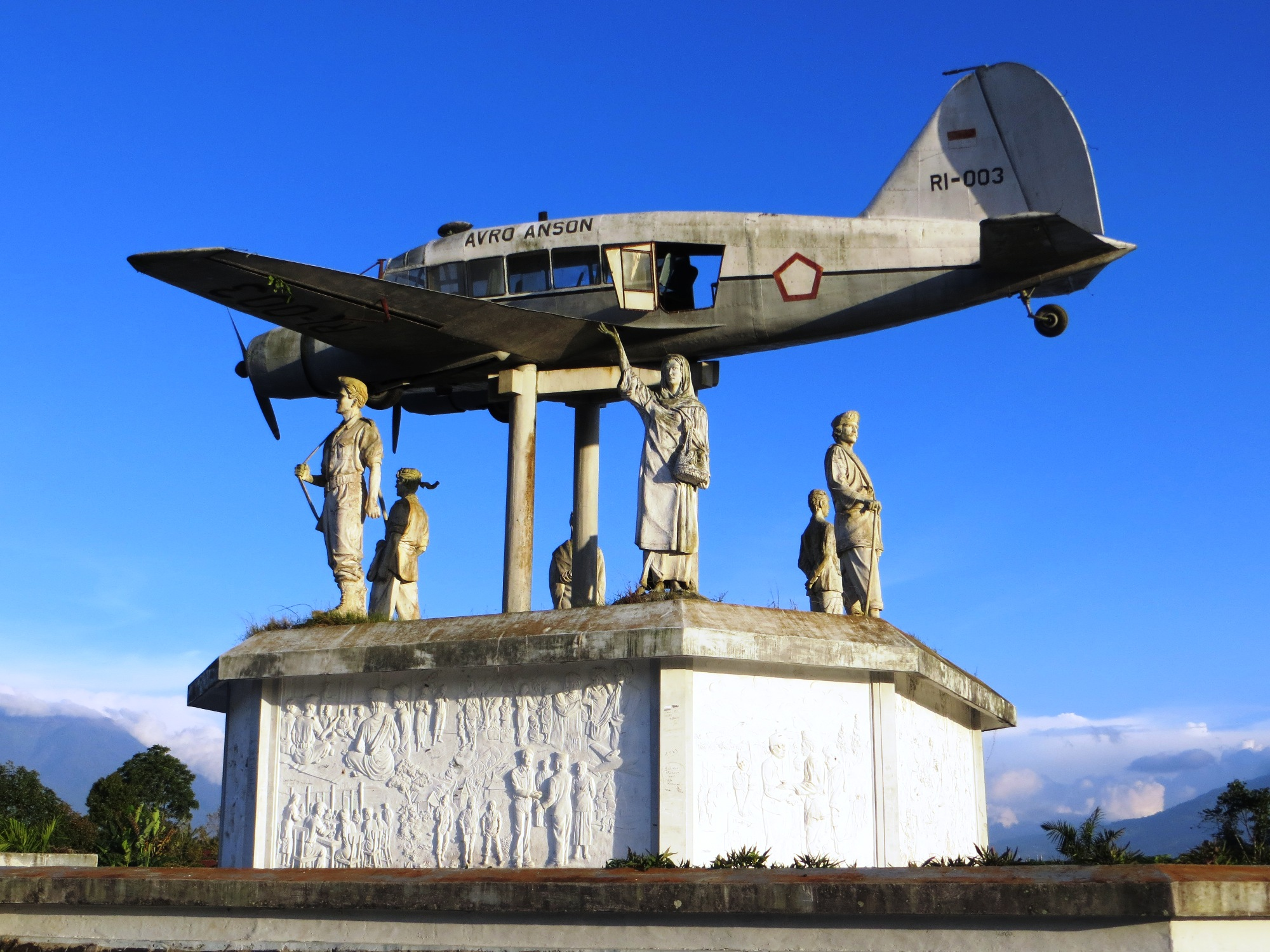 Avro Anson RI 003 adalah pesawat ke tiga yang dimiliki Pemerintah Republik Indonesia yang diperloeh dari sumbangan masyarakat Minang terutama amai-amai (ibu-ibu) yang dengan sukarela menghibahkan perhiasan emas dan peraknya untuk memperjuangkan kedaulatan Indonesia.